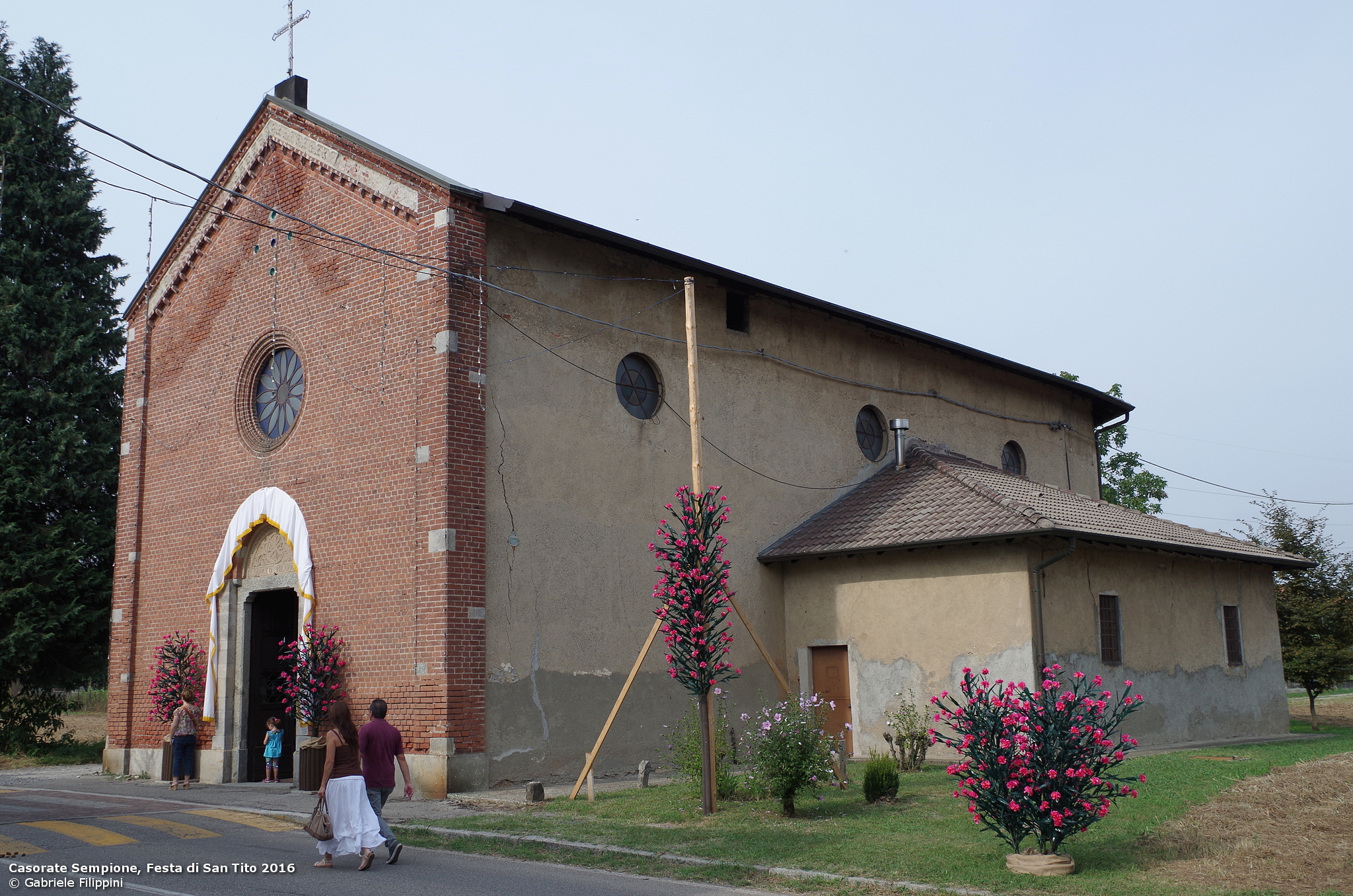 chiesa sant'ilario 2